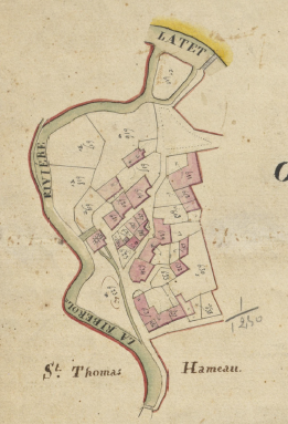 Sant Tomàs de Balaguer en el Cadastre napoleònic del 1812 (Arxius Departamentals dels Pirineus Orientals)